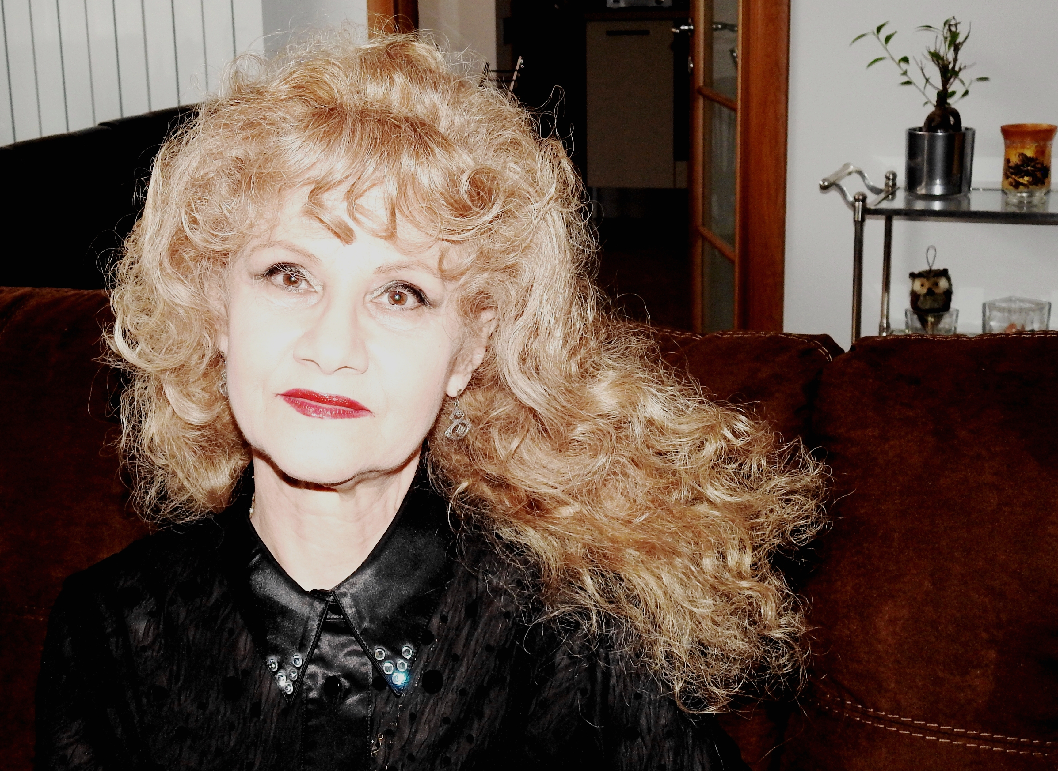 Poeta si scriitoarea Ioana Diaconescu, 2016